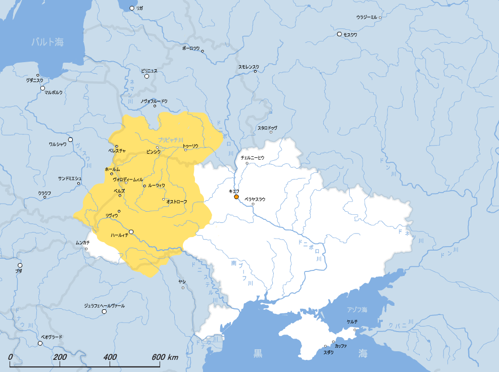 Мала Русь (Малоросія) у